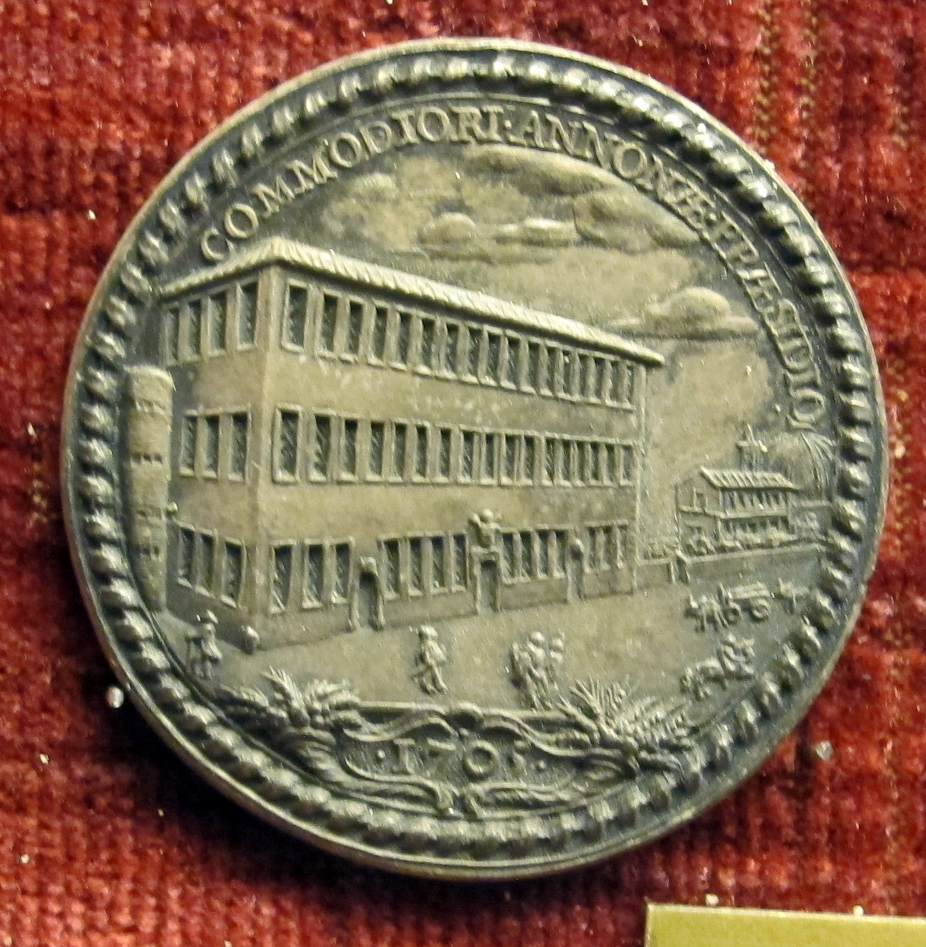 Medaglie romane '600-'700